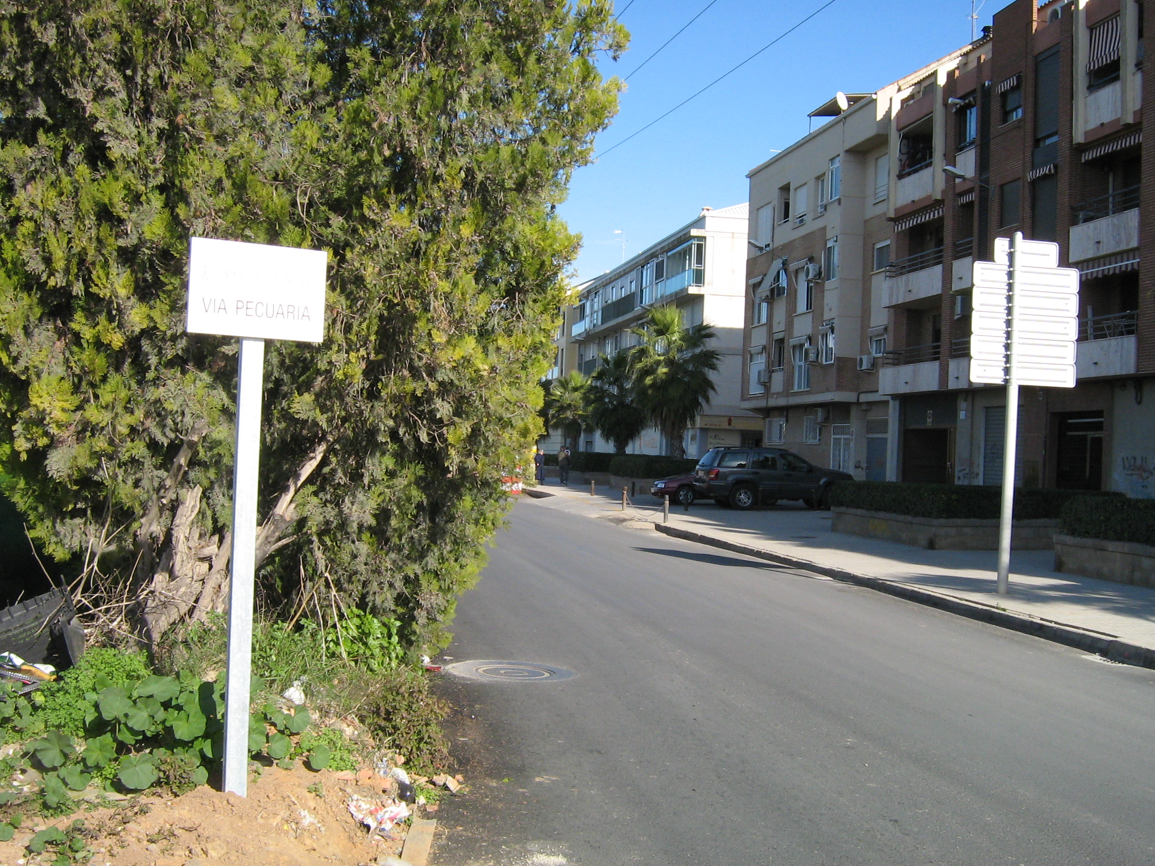 Camí vell de Picassent a Benetússer